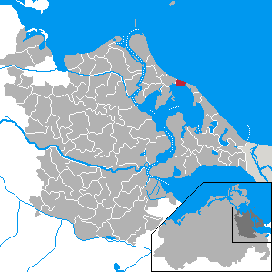 Zempin, Landkreis Ostvorpommern, Mecklenburg-Vorpommern